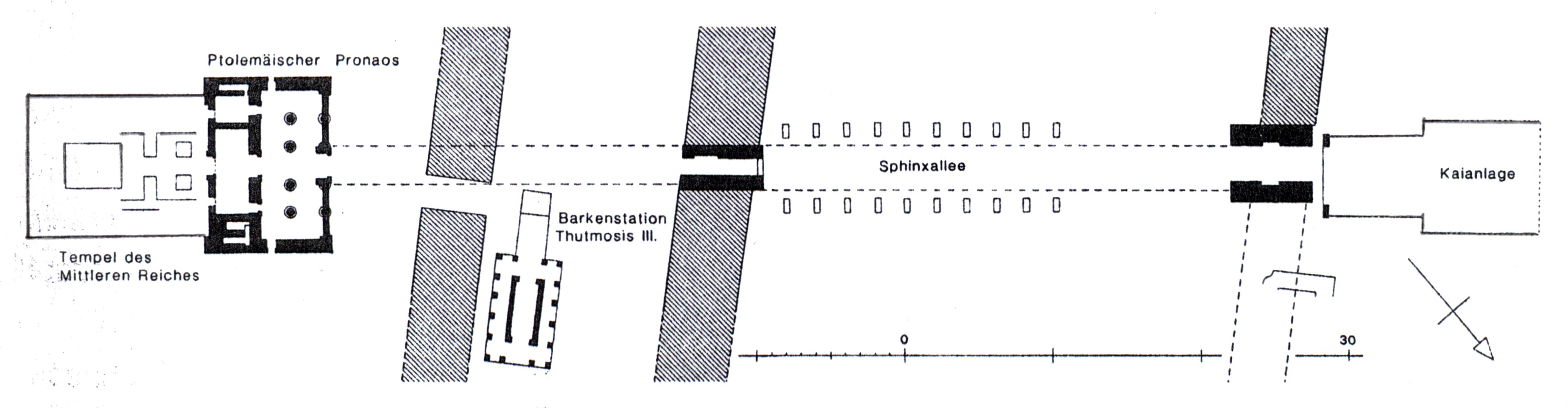 Plan des Month-Tempels von el-Tôd, Ägypten